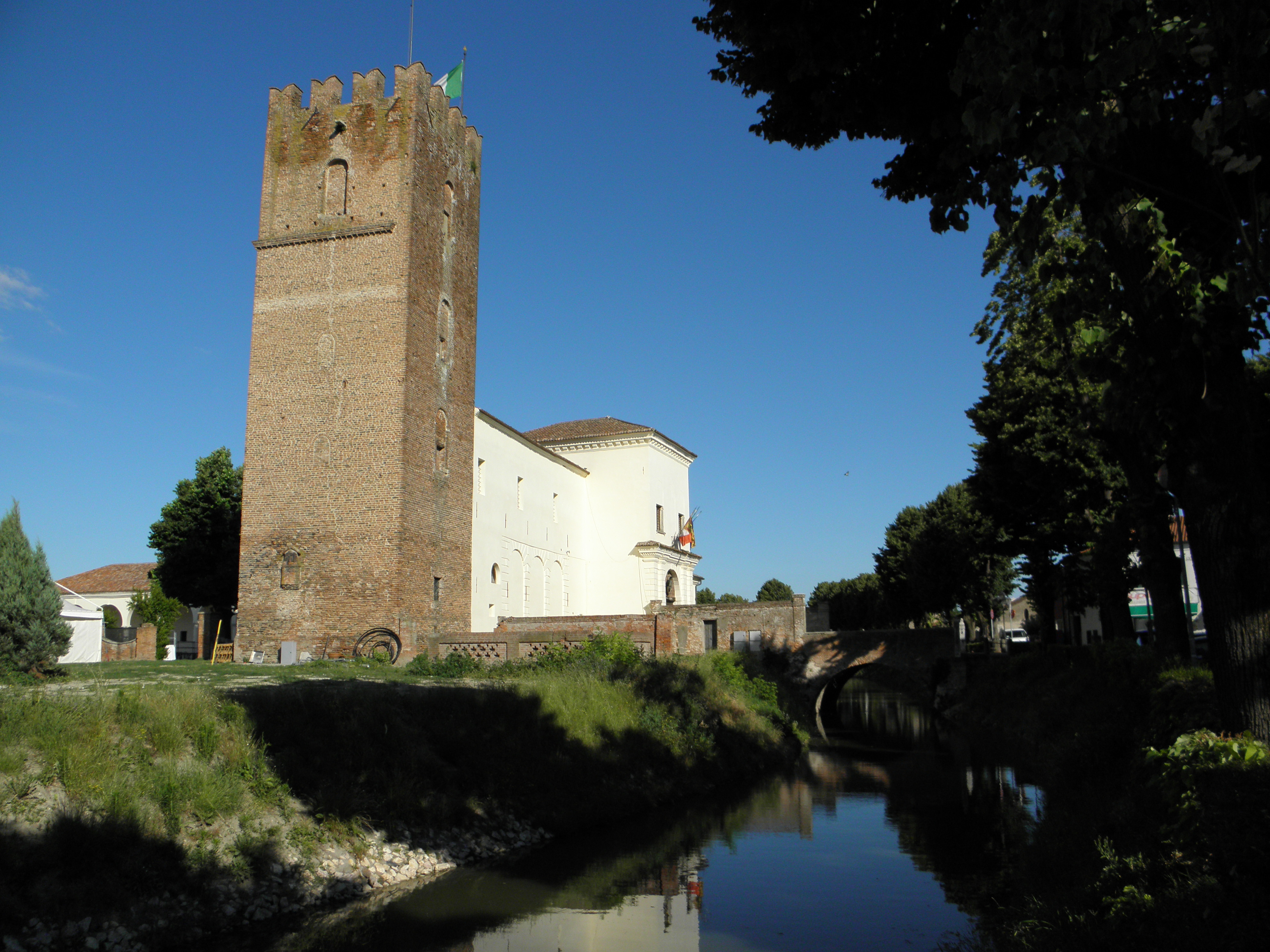 Arquà Polesine: vista complessiva della villa-castello con la torre medioevale, il ponte ed il canale.